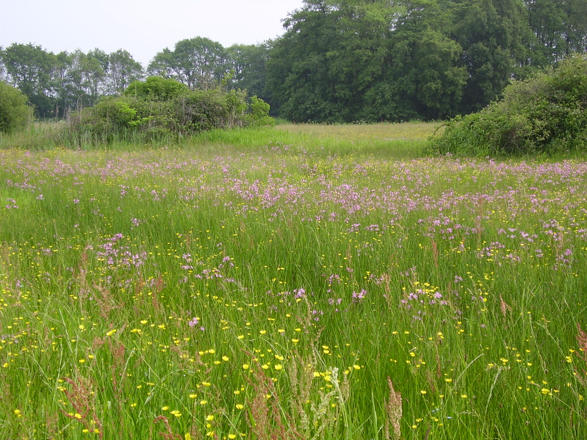 Koekoeksbloemenhooiland